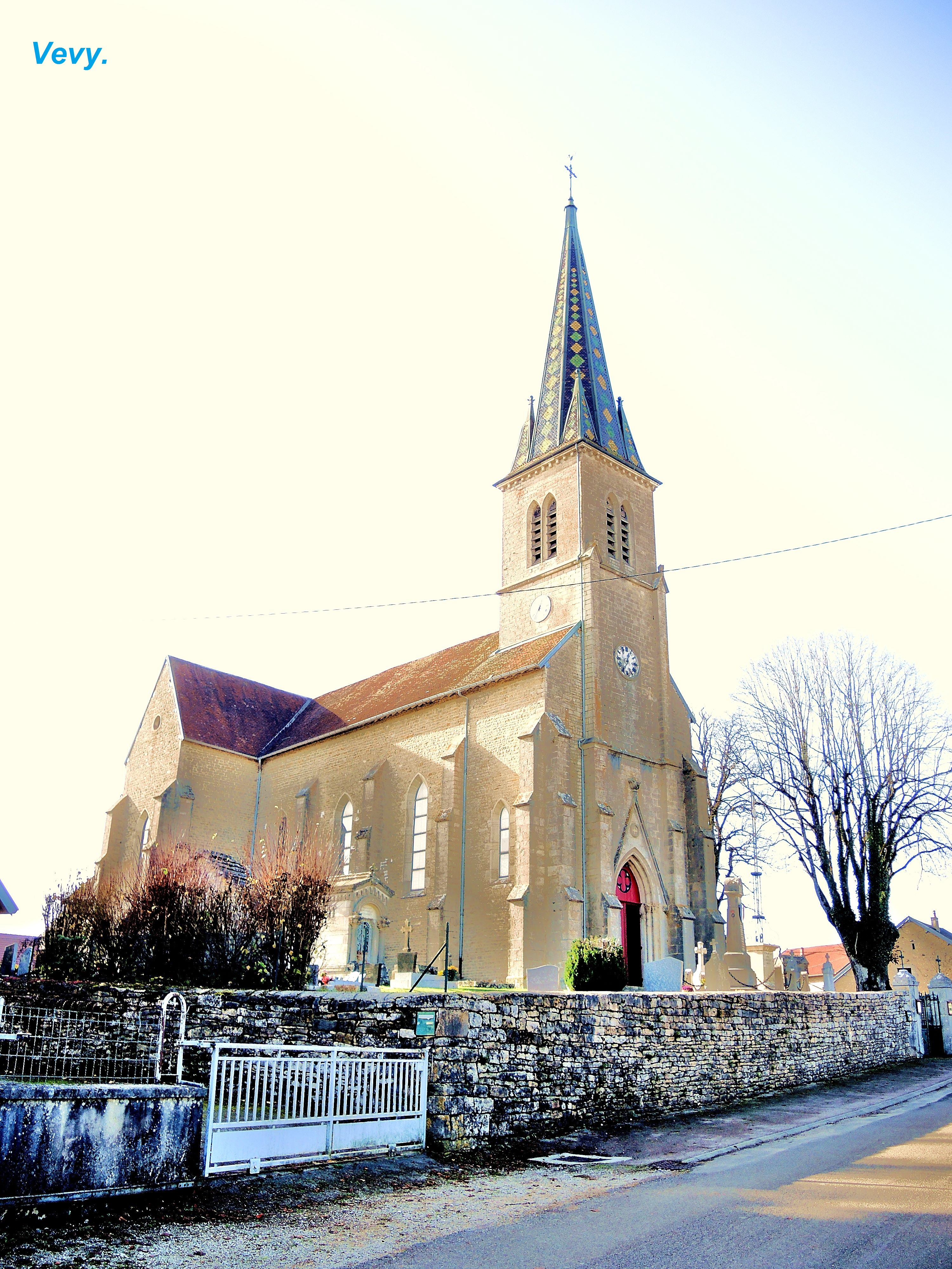 Eglise de Vévy. Département du Jura. France.